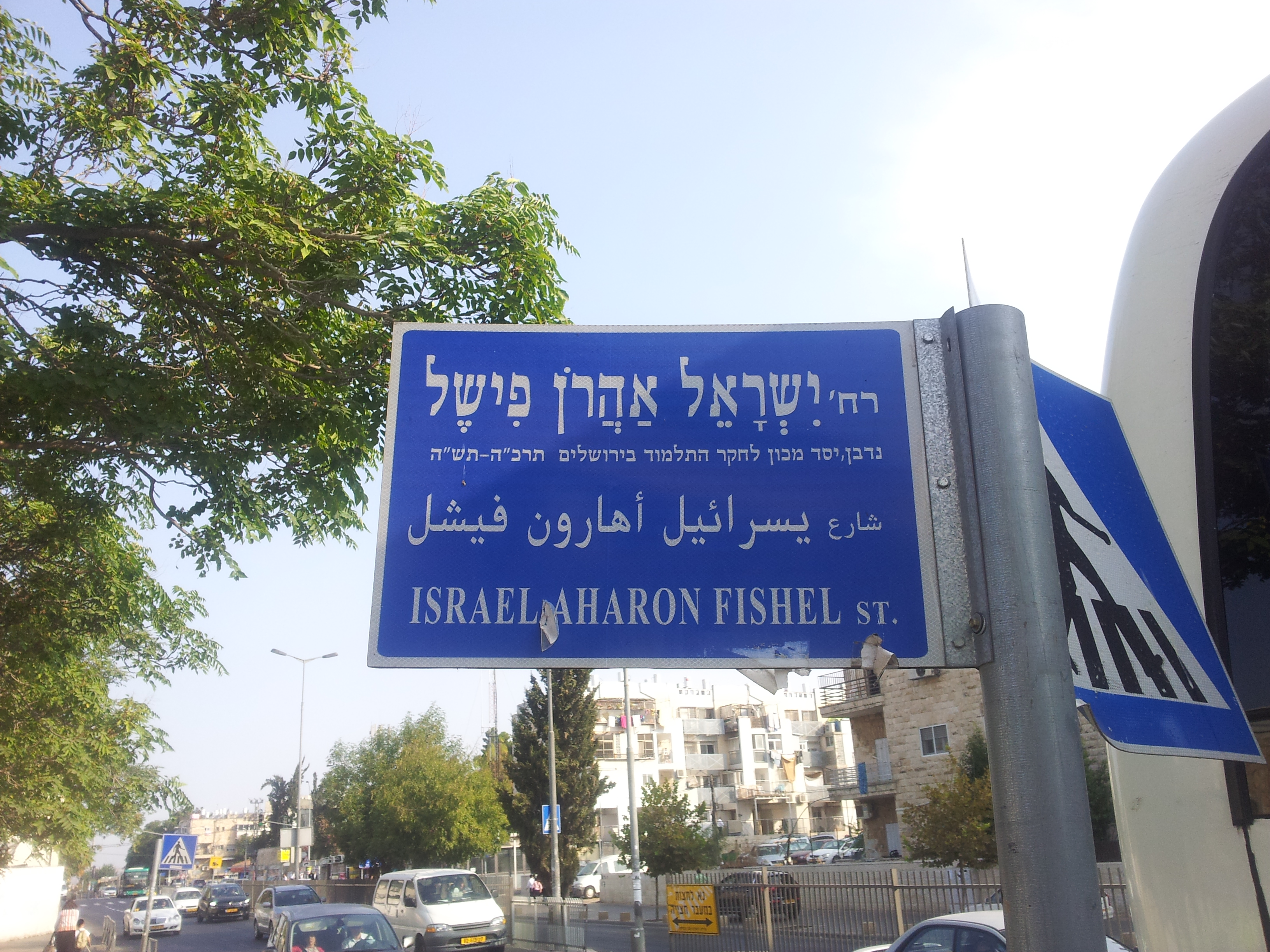 שלט רחוב ישראל אהרן פישל בירושלים